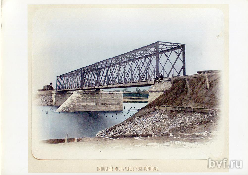 Никольский мост через реку Воронеж